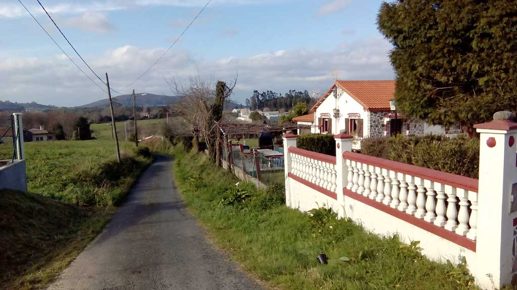 Vista da Mata, Castro, Narón.